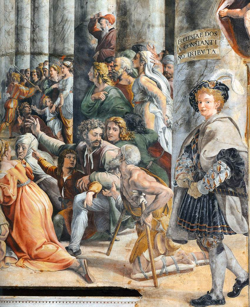 detail